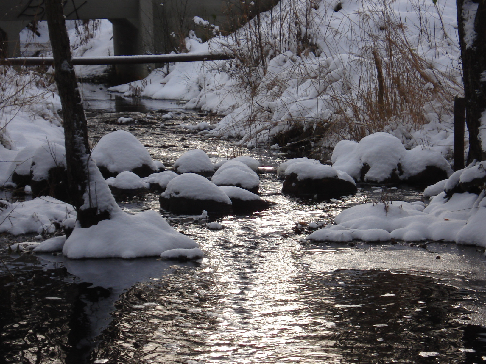 Vēršupīte pie dzelzceļa ziemā